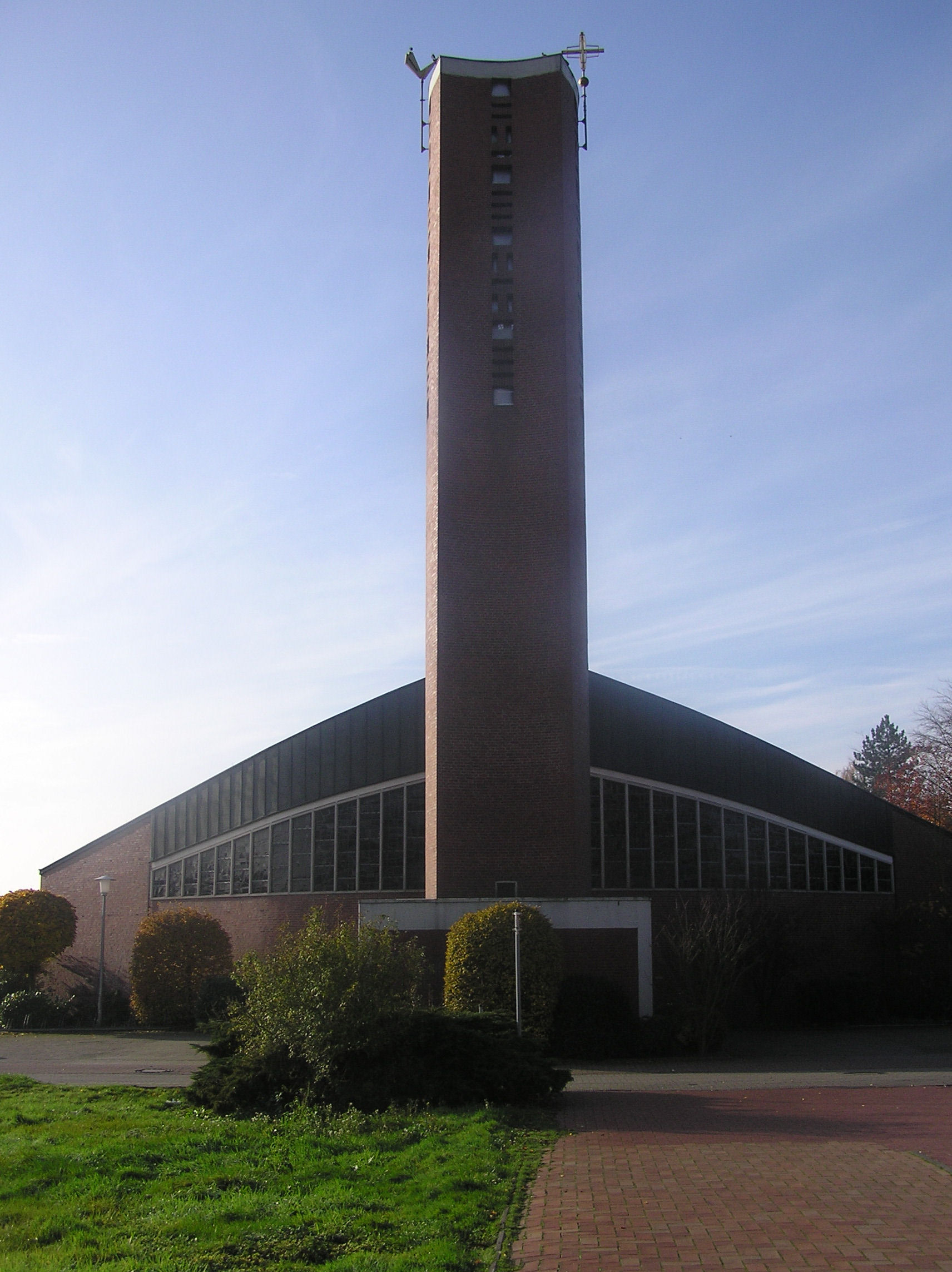 Kath. Kirche St. Paulus in Quakenbrück, Hengelage